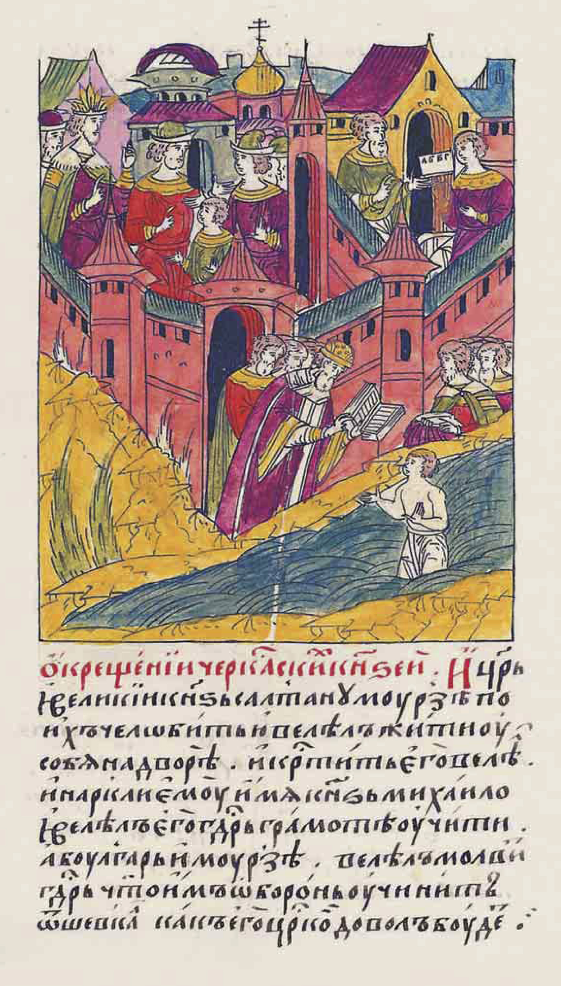 О крещении черкасских князей. И царь и великий князь согласно их челобитью велел Салтан-мурзе жить у себя на дворе и велел его крестить, и назвали его князем Михаилом, и велел государь учить его грамоте; а Булгар-мурзе велел сказать государь, что устроит им оборону от Шевкал, как только будет возможность.